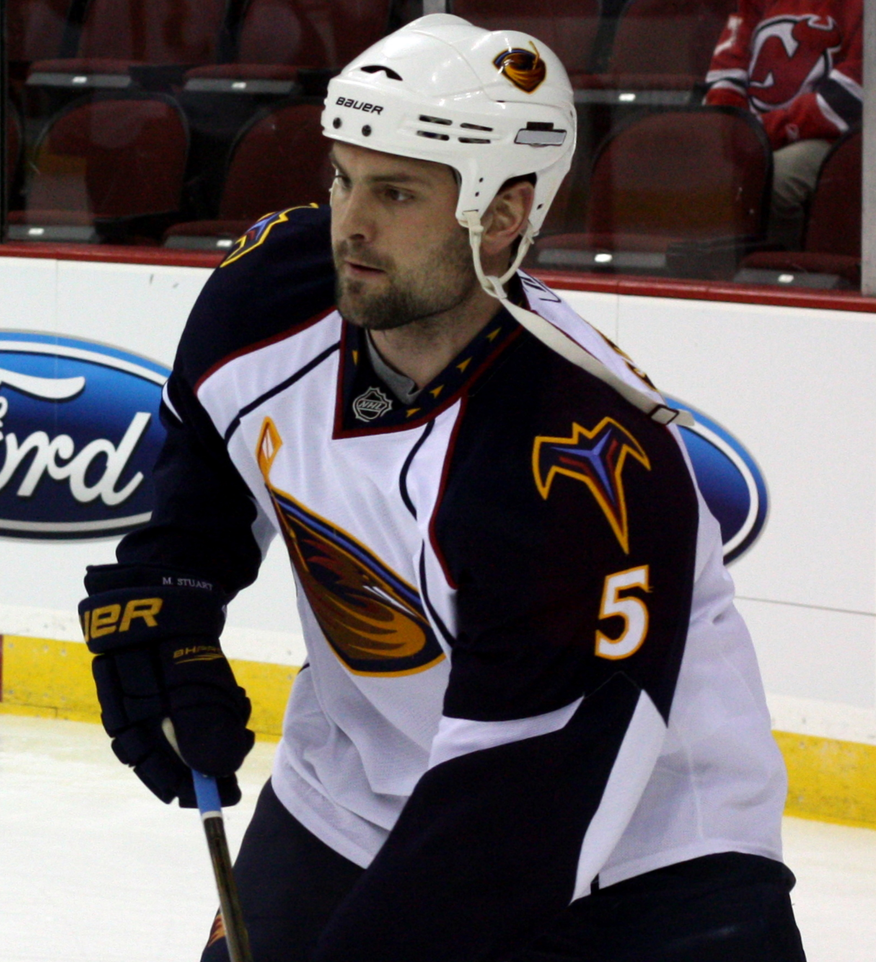 Mark Stuart in March 2011.